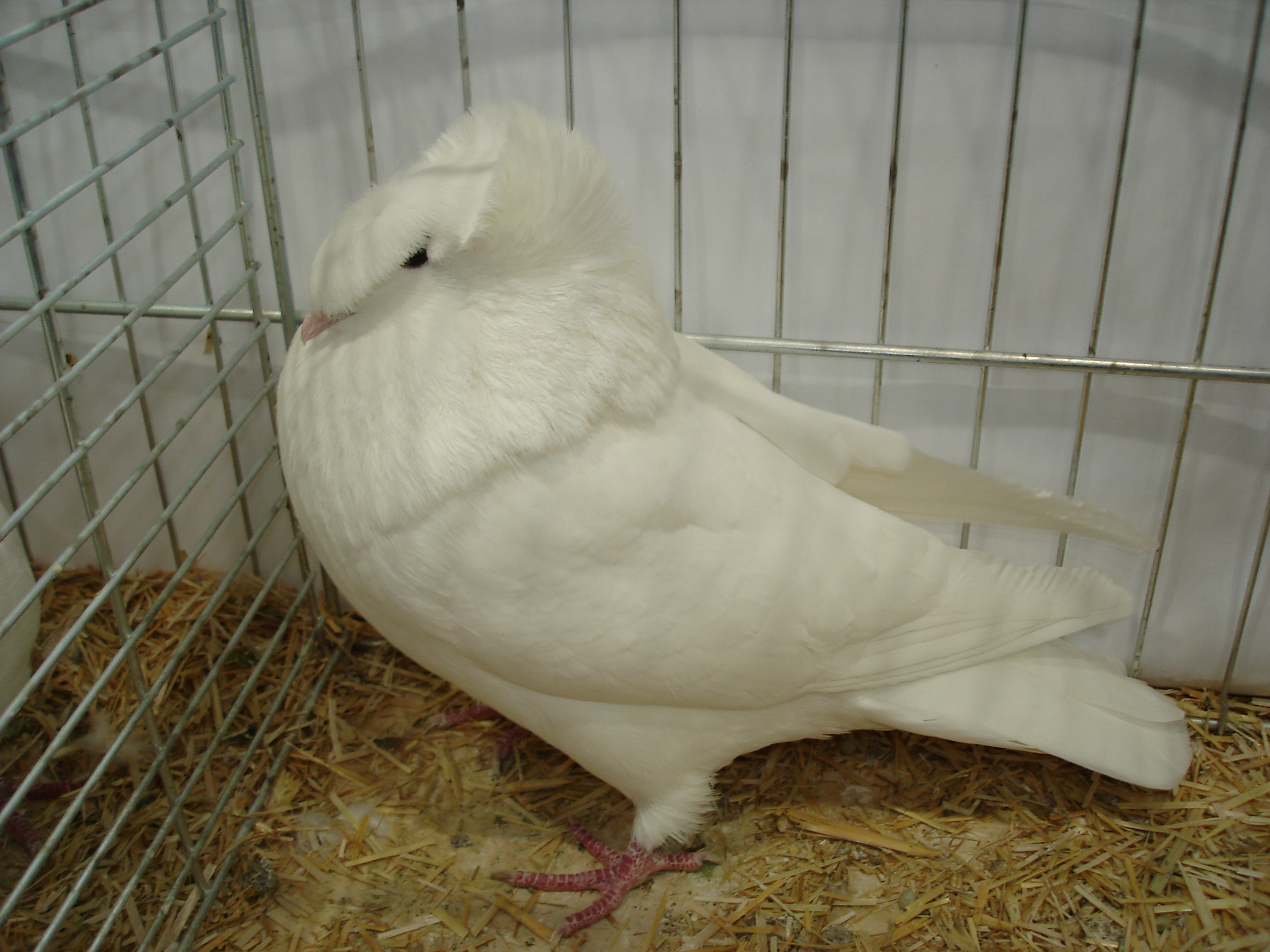 Zdjęcie gołębia